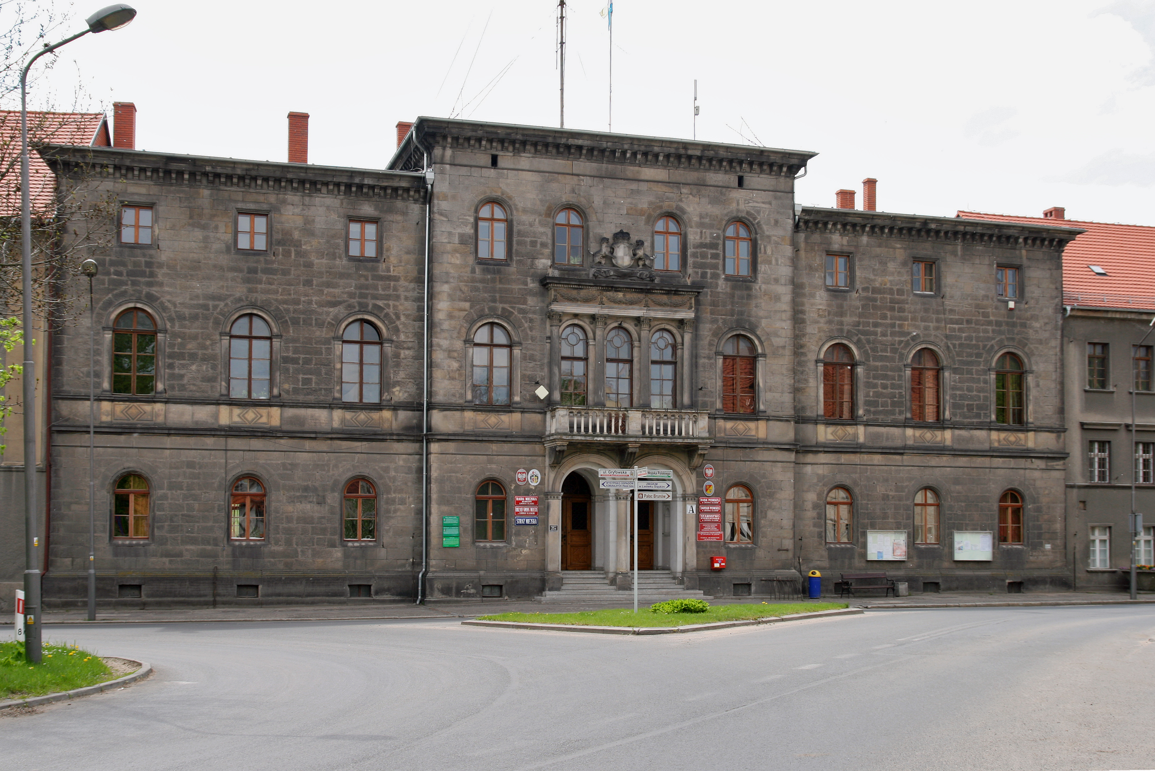 Budynek Urzędu Gminy i Miasta w Lwówku Śląskim.